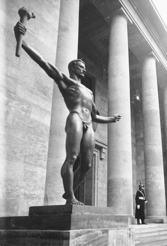 Berlin, Neue Reichskanzlei, Statue "Partei" ADN-Zentralbild / Archiv Die neue Reichskanzlei in Berlin UBz: einen Blick in den Ehrenhof mit der Plastik "Partei" von Prof. Arno Breker. Aufnahme 1942, 36481-42